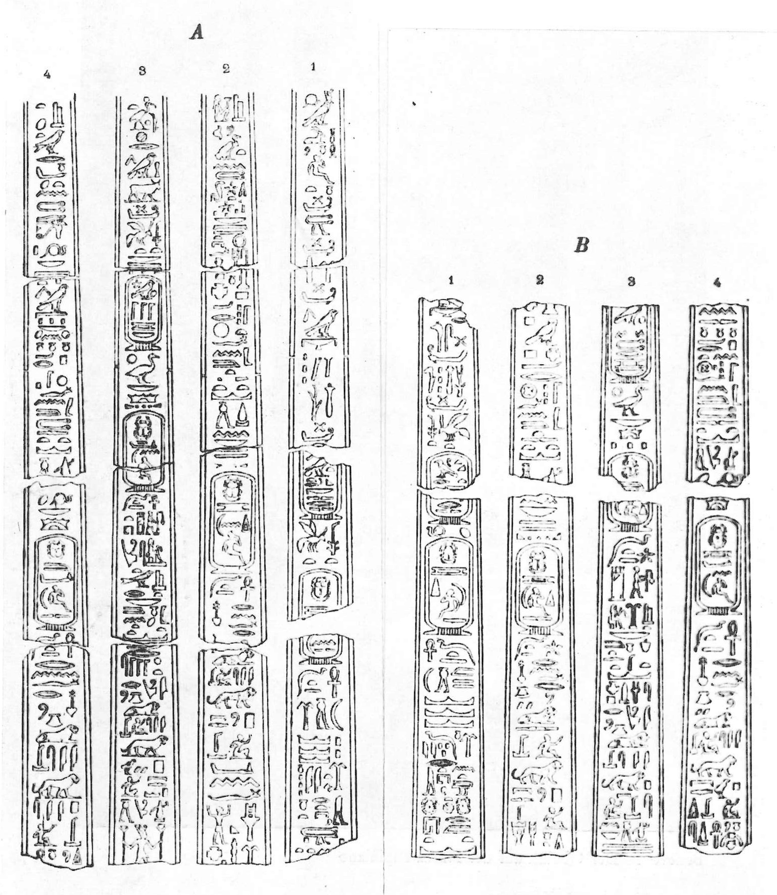 I geroglifici dei due obelischi neoegizi del tempio di Iside di Benevento